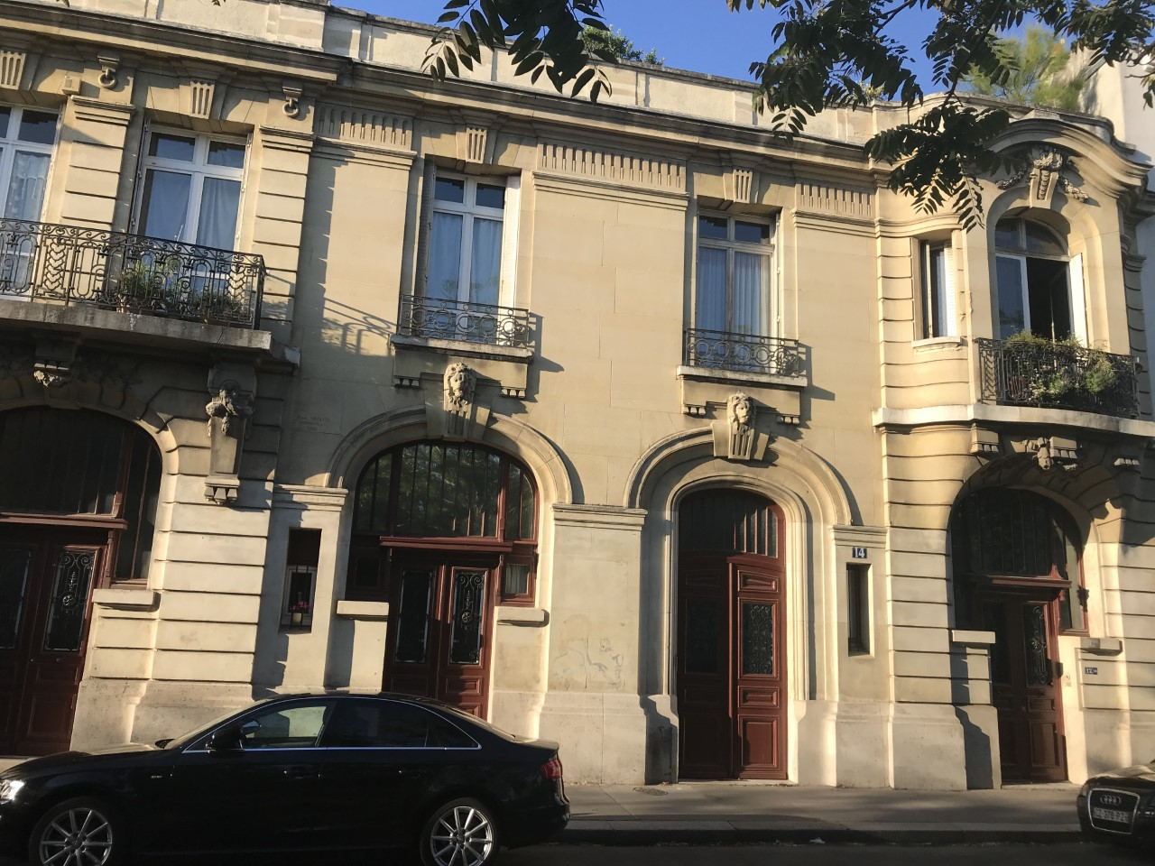 14 bd Edgar-Quinet, Paris XIVe.